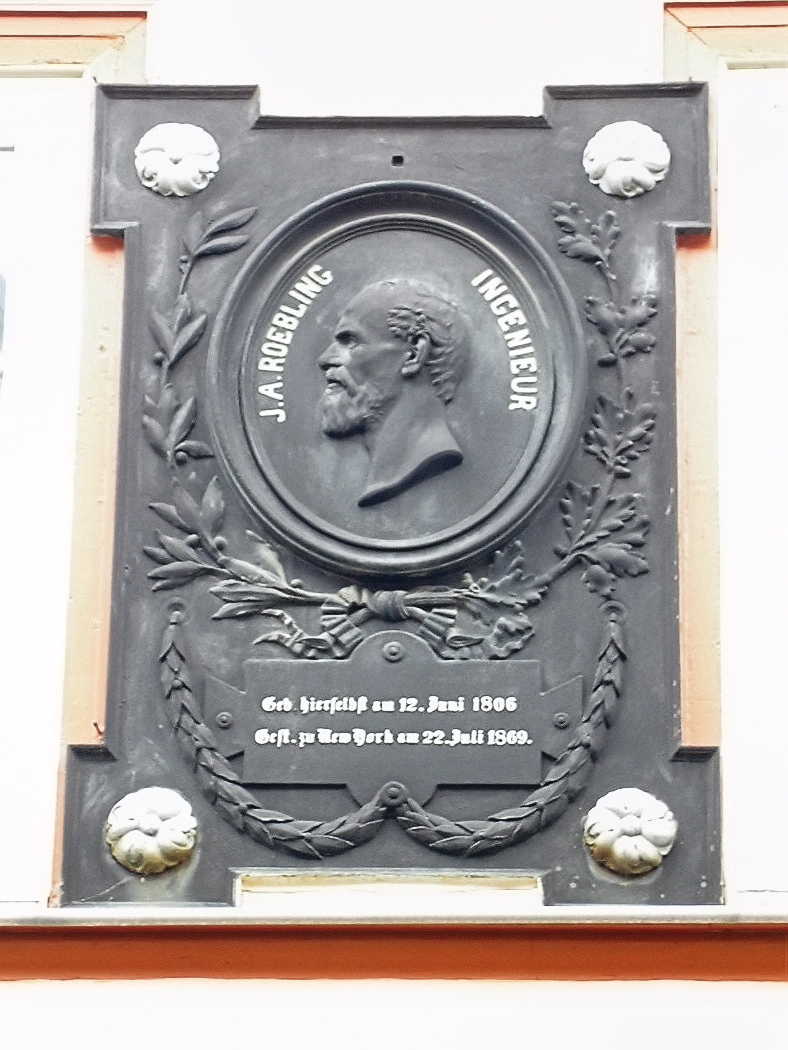 Gedenktafel am Geburtshaus des Architekten Röbling in Mühlhausen/Thüringen.